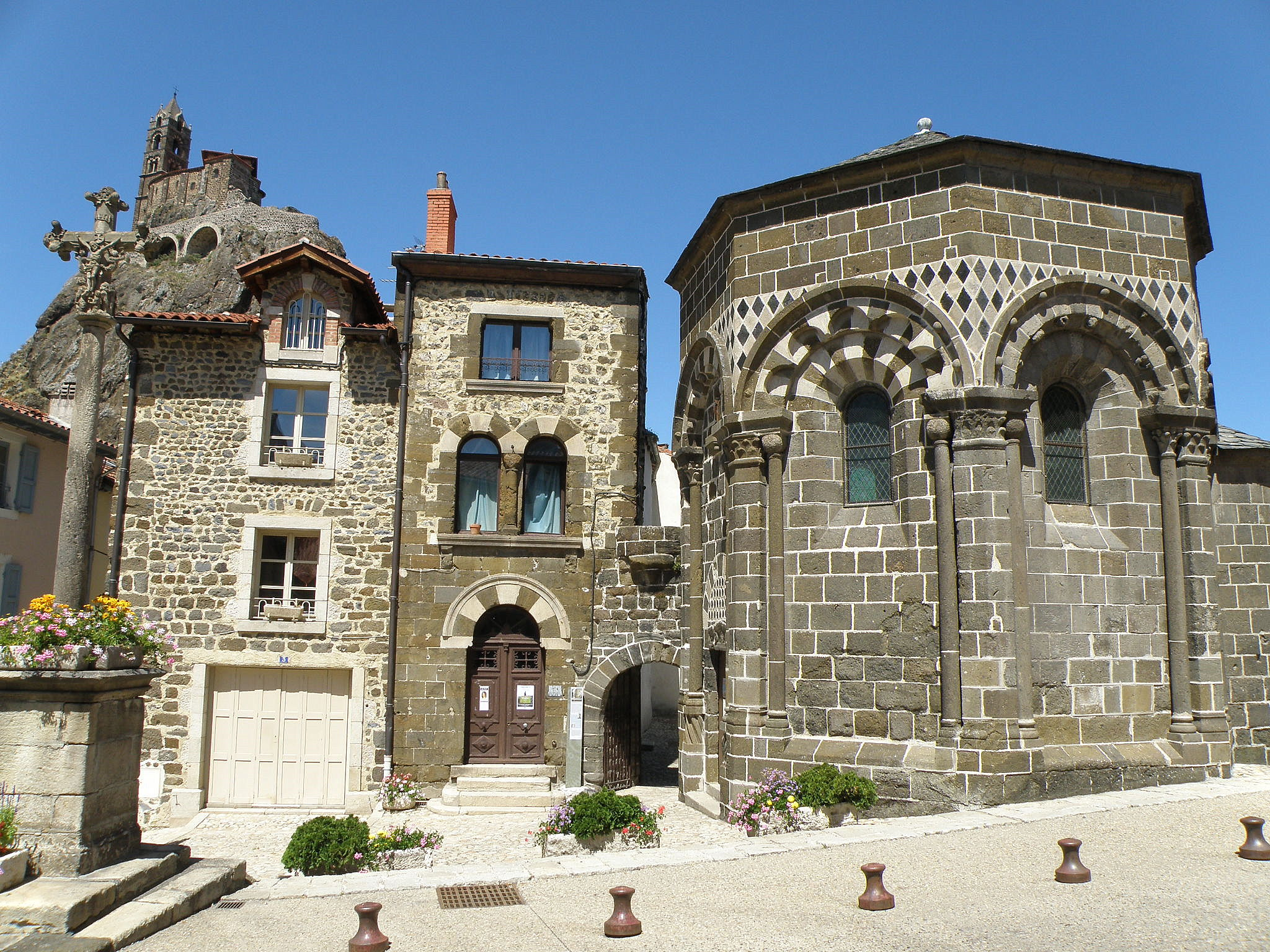 Commune d'Aiguilhe, près du Puy-en-Velay (préf. de la Haute-Loire, France). Placette à l'entrée du bourg, bordée à droite par la Chapelle Saint-Clair (XIIe siècle, octogonale) et, à gauche de celle-ci, par l'ancienne mairie d'Aiguilhe. Tout à fait à gauche : croix monumentale historiée en pierre du XVe siècle. Au fond à gauche: église Saint-Michel sur son rocher.